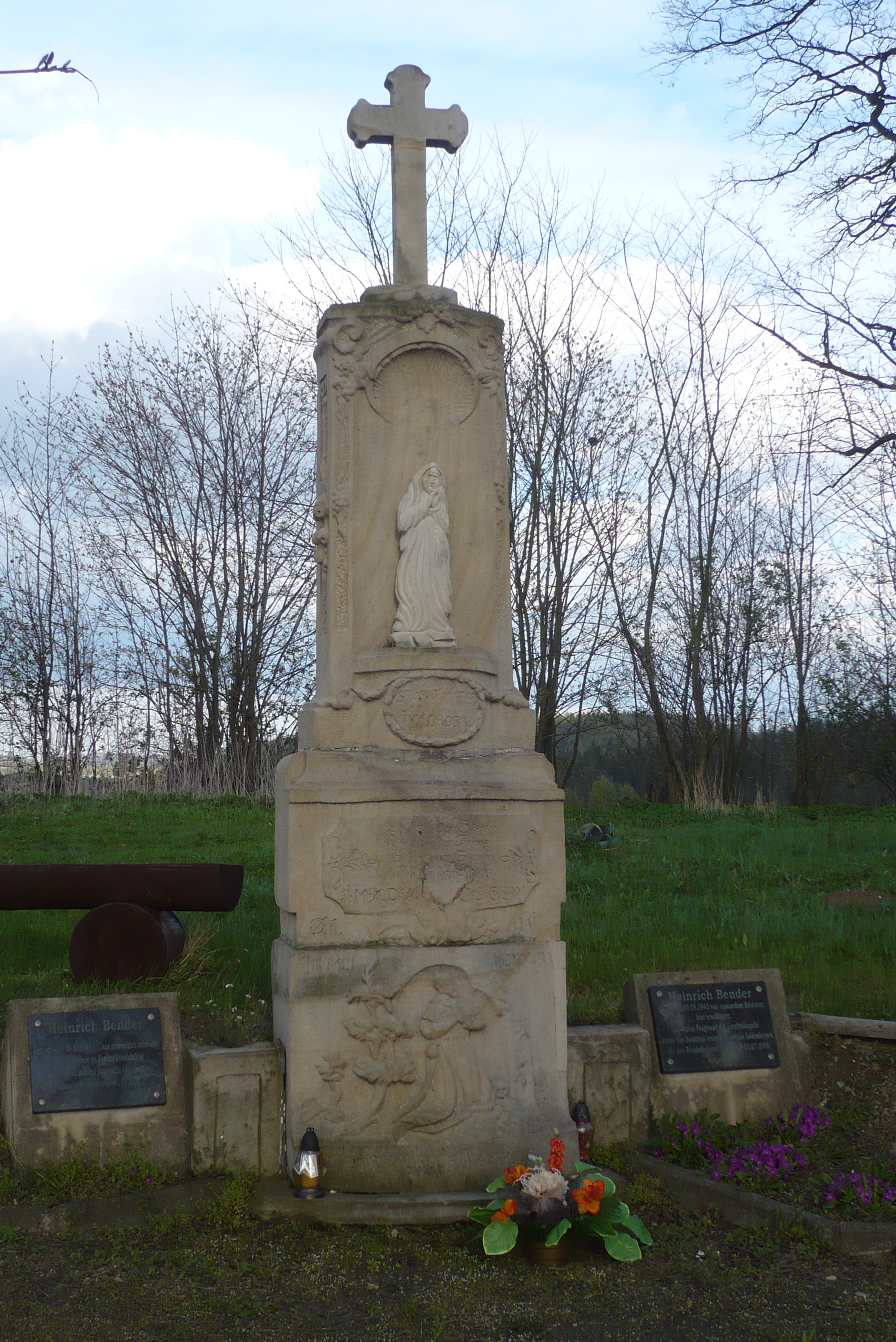 Bożków. Kapliczka